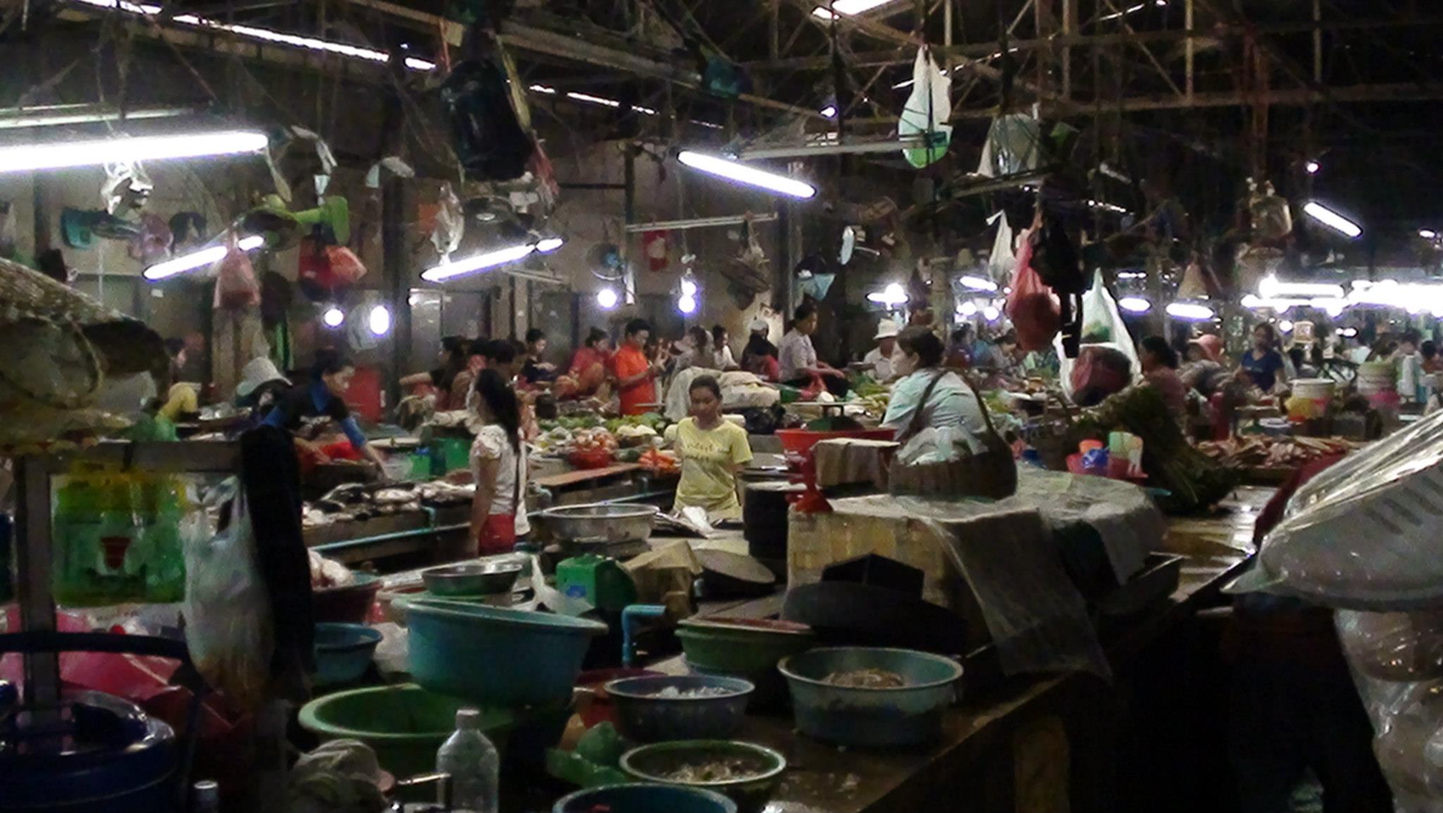 Market at Siem Reap - Cambodia